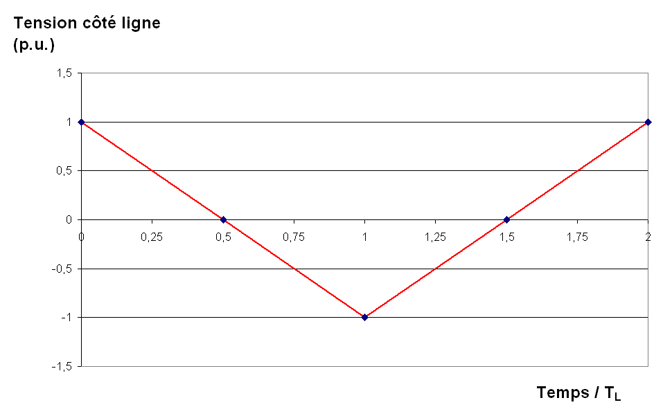 voltage on line side during SLF interruption